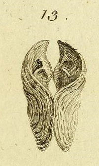 Barnea parva (Pennant, 1777), Pholadidae, Myoida, Bivalvia, Mollusca (from Thomas Pennant: British zoology. Vol. IV. Crustacea. Mollusca. Testacea. p. III-VIII, 1-154, pls. I-XCII (= 1-93), London, White, 1777 (pl.40)